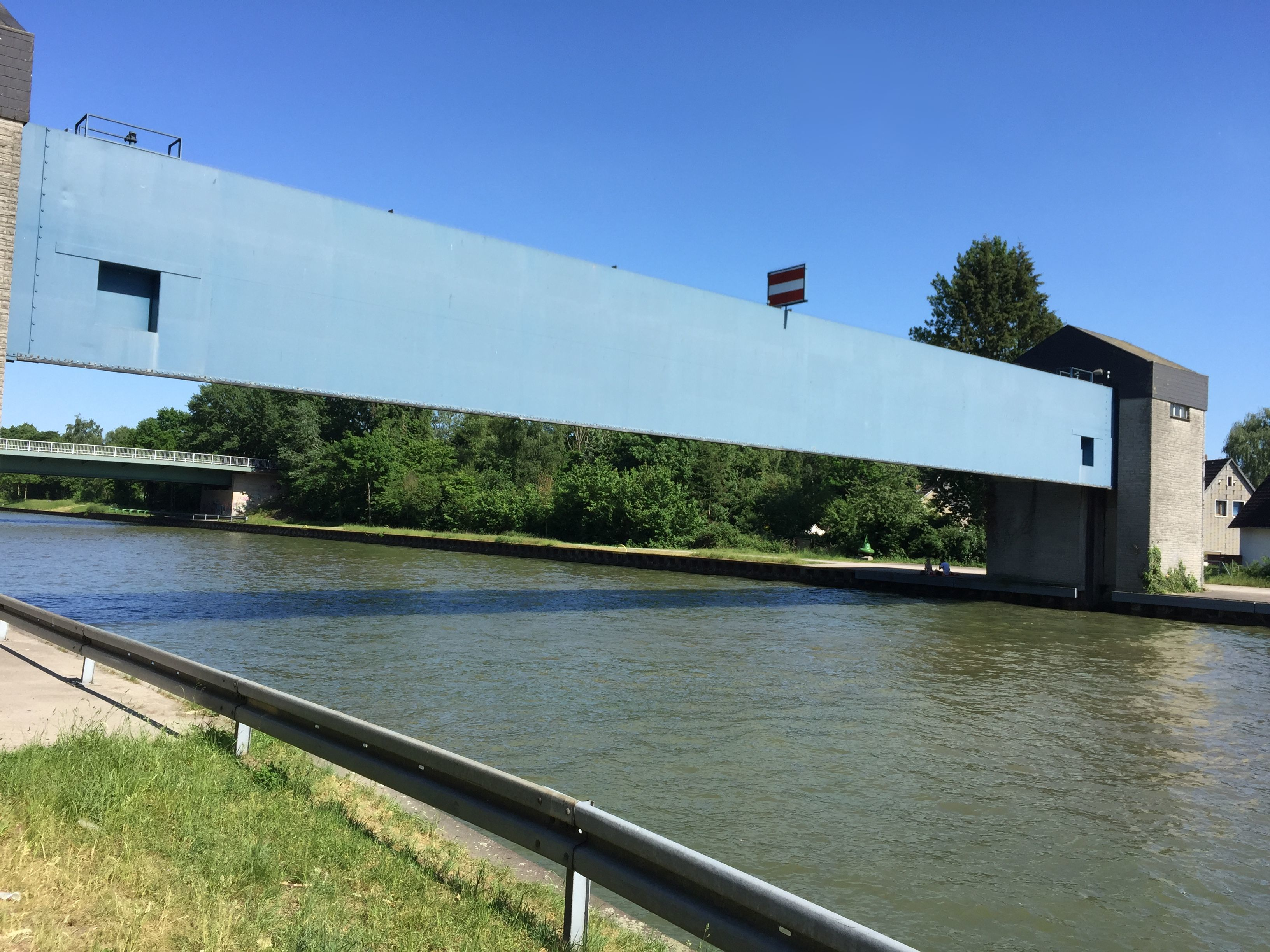 Mit den Sicherheitstoren in Havelse und Lohnde kann der Mittellandkanal um die dazwischen liegende Kanalstrecke abgeschottet und trocken gelegt werden. Des Weiteren dienen diese Tore als Sicherheitsdamm um ein Auslaufen des Kanalwassers bei einer Undichtigkeit zu verhindern